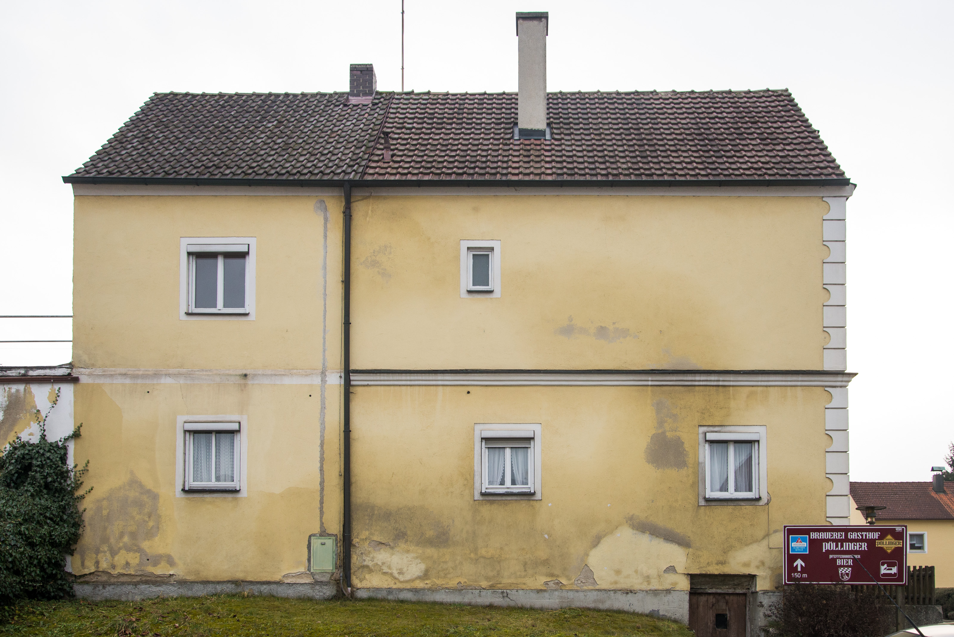 Sogenanntes Schloss, ehemaliger Sitz des Amtmanns, zweigeschossiger und giebelständiger Satteldachbau mit Erker, Eckrustizierung und Putzgliederung, Mitte 16. Jahrhundert. This is a photograph of an architectural monument.